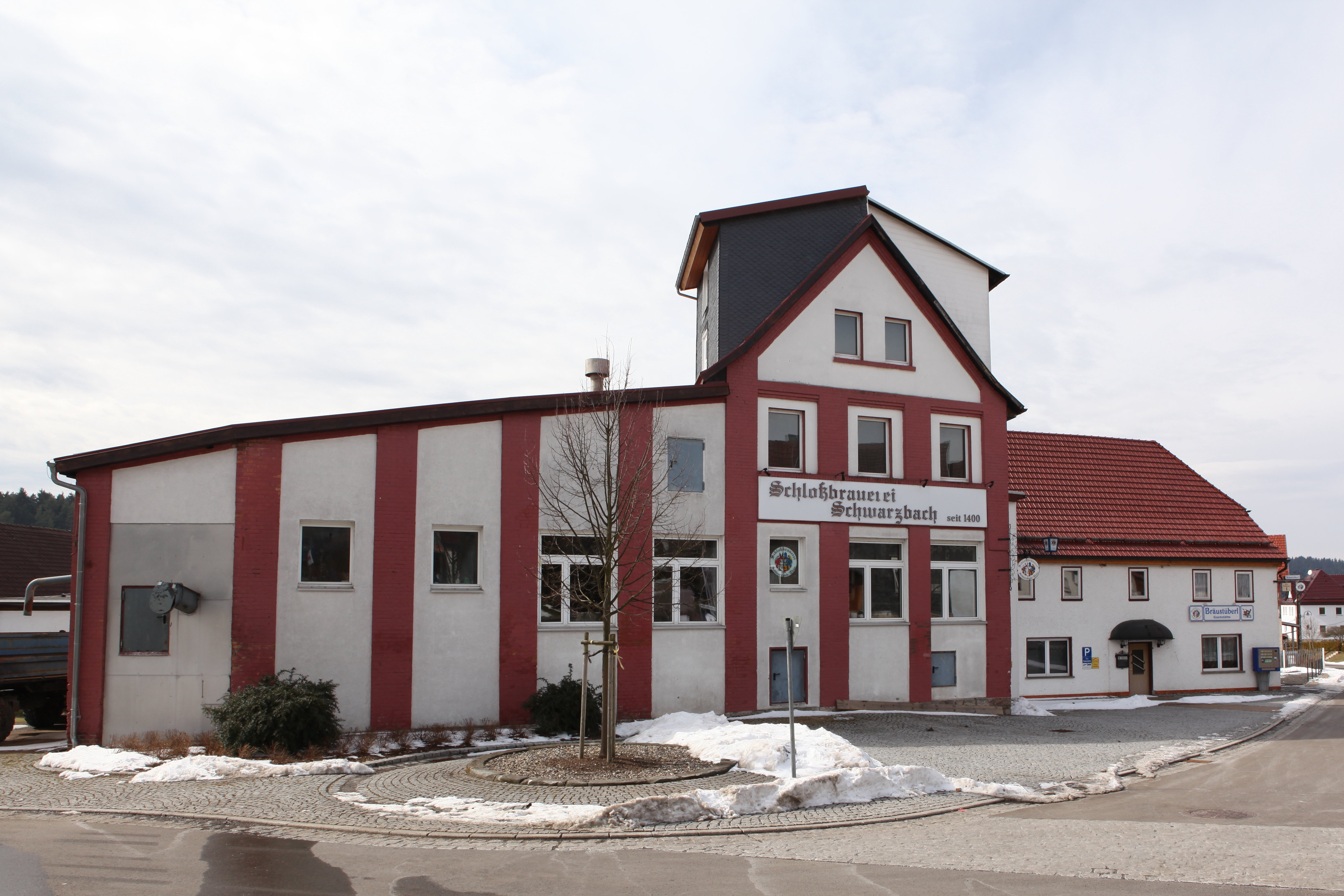 Schlossbrauerei in Schwarzbach, OT von Auengrund, Landkreis Hildburghausen